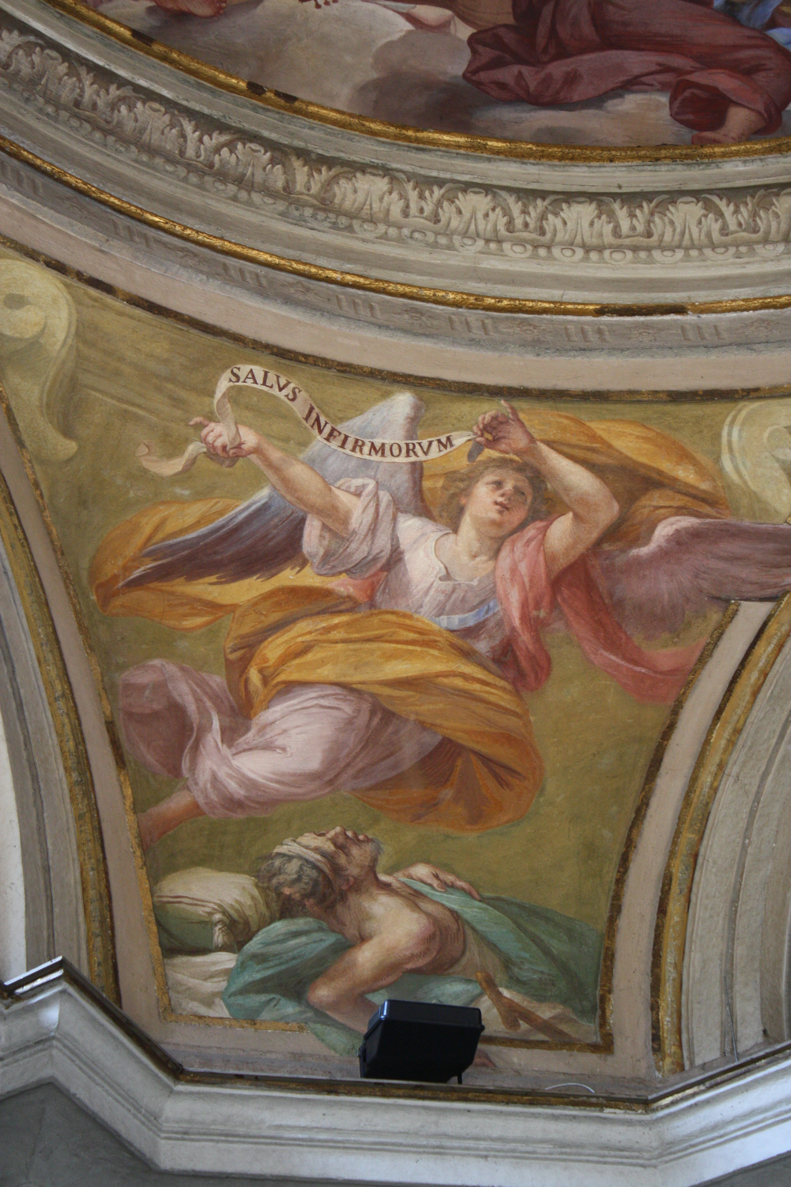 Affreschi su uno dei pennacchi del Tempio Civico della Madonna delle Grazie di Busto Arsizio